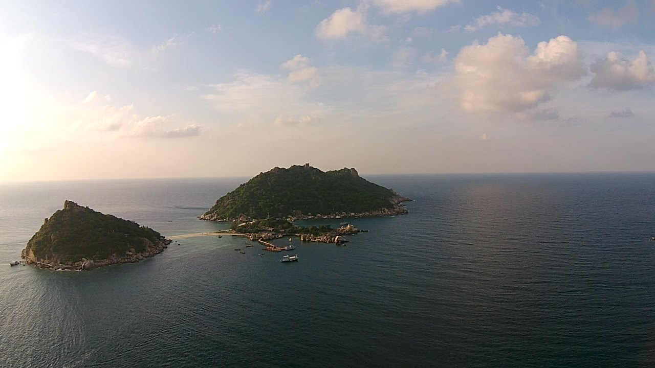 Острова Nang Yuan